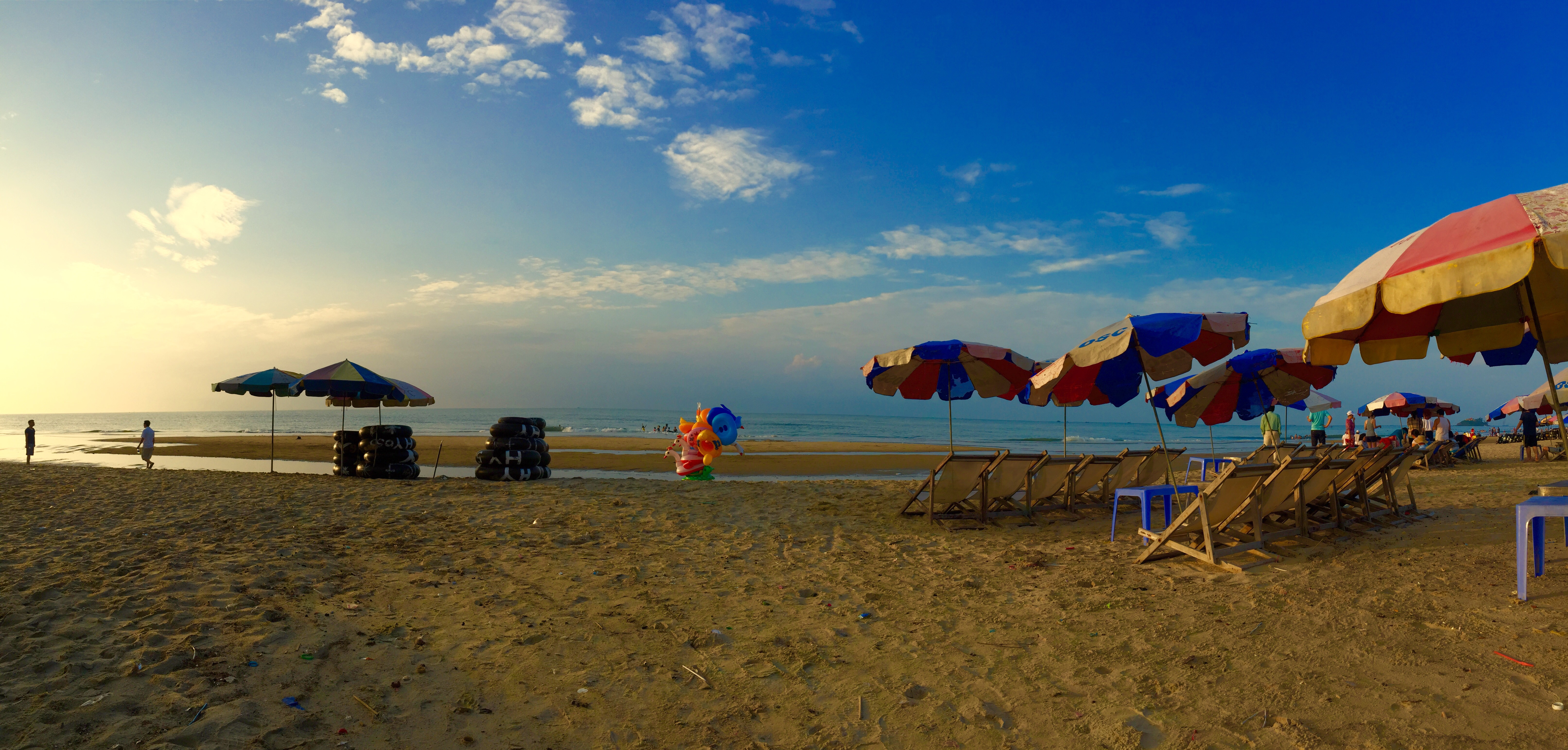 Bai bien Vung tau, vietnam